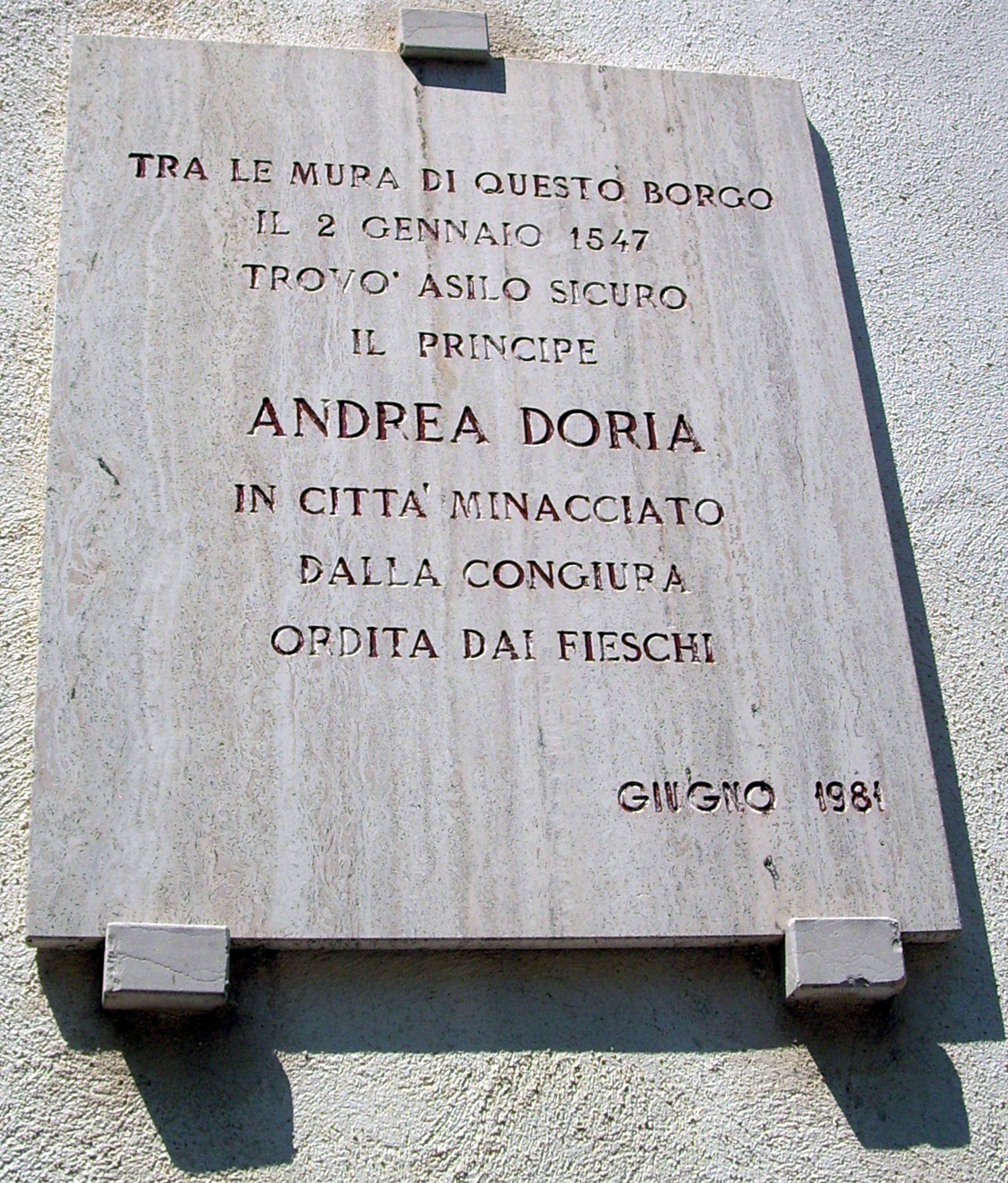 Targa in memoria di Andrea Doria presso Masone, Liguria, Italia